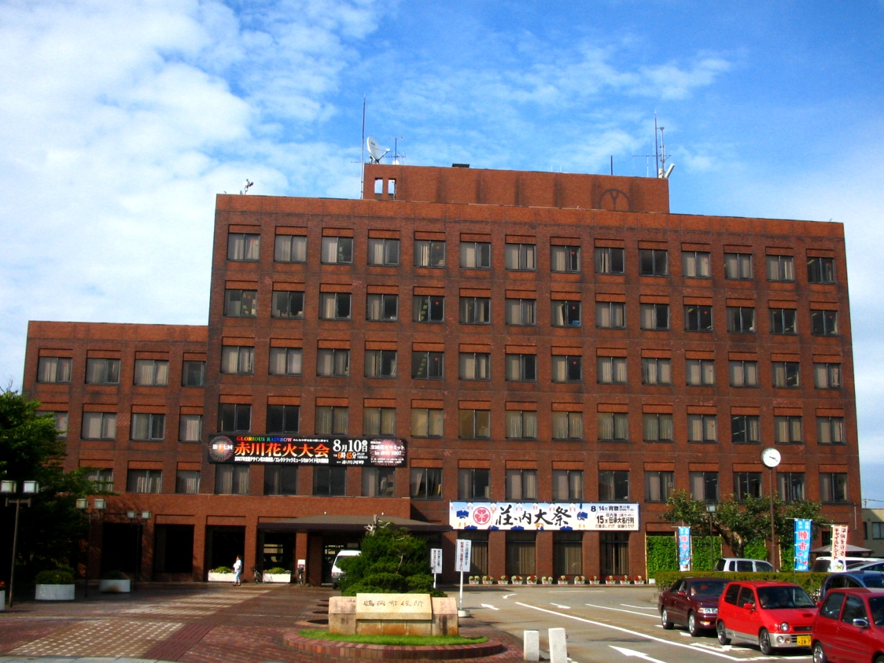 鶴岡市役所 山形県鶴岡市 2007年8月10日15:23 投稿者撮影